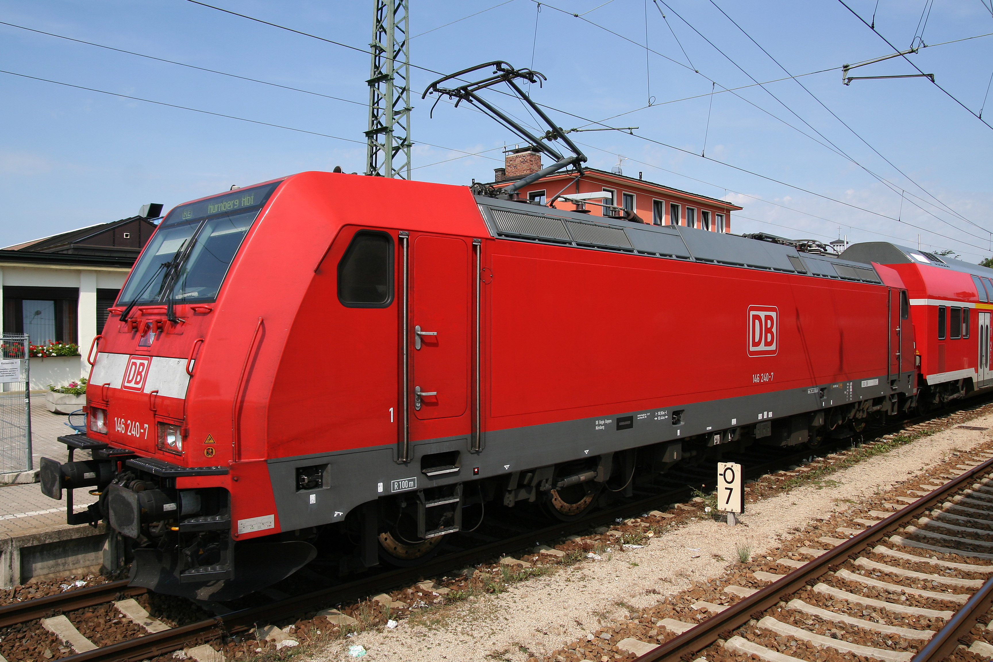 Eine Lokomotive der Baureihe 146.2 in Ingolstadt Hbf